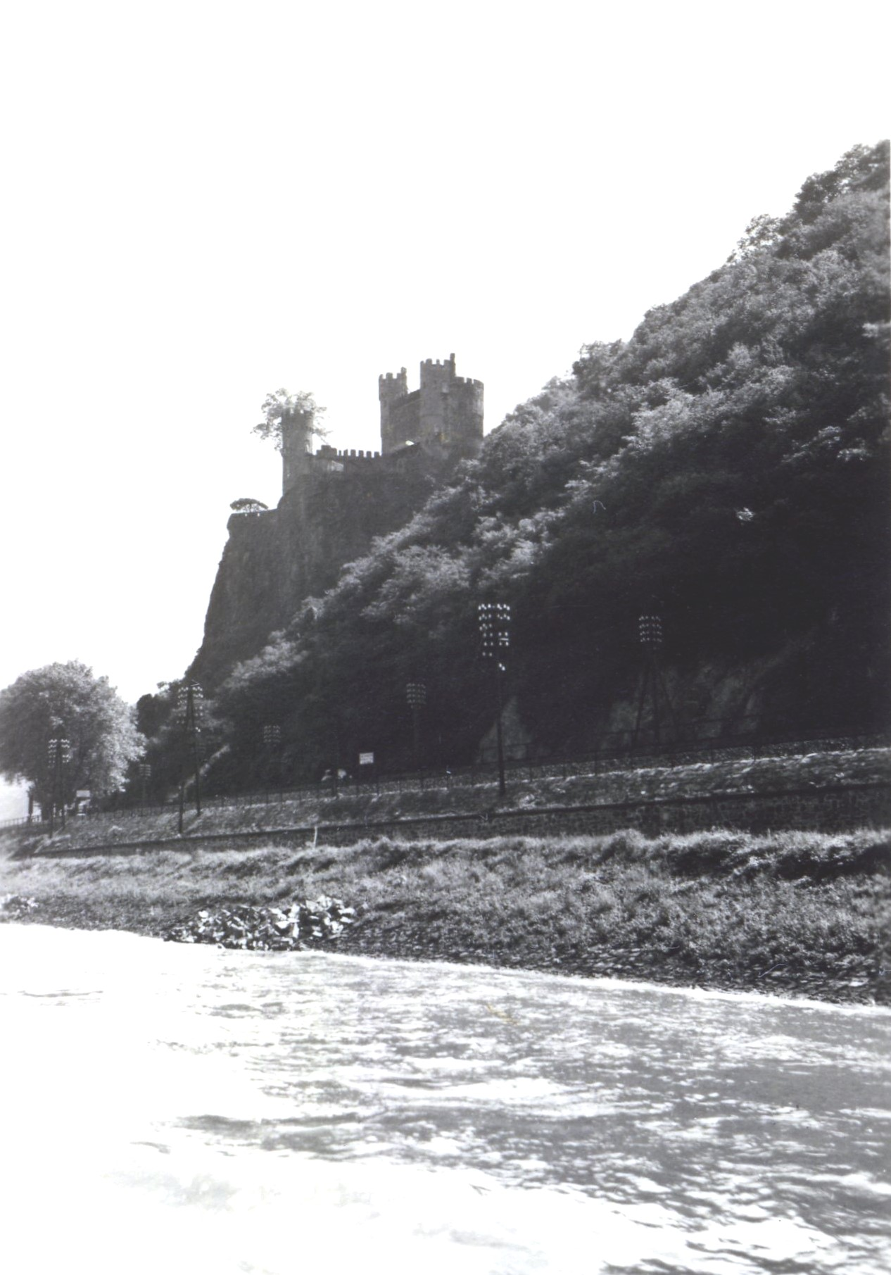 Blick auf Burg Rheinstein im Juli 1938